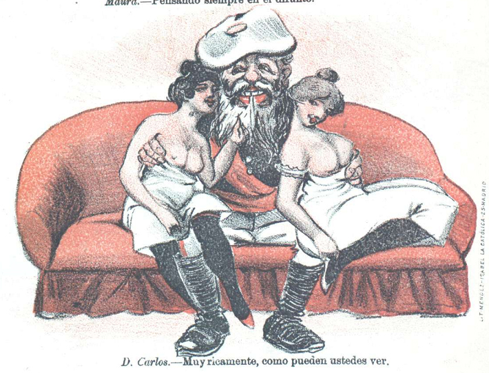 Caricatura.